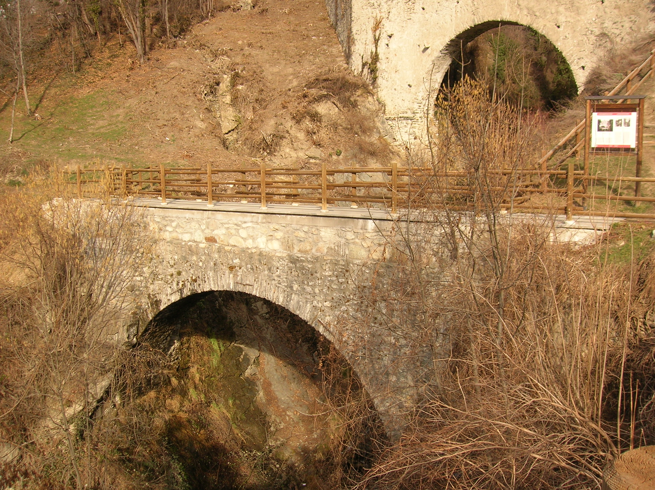 Il Ponte acquedotto di Grand Arvou e, più vicino, il ponte acquedotto di Petit Arvou, in località Porossan, Aosta, Valle d'Aosta, Italia.